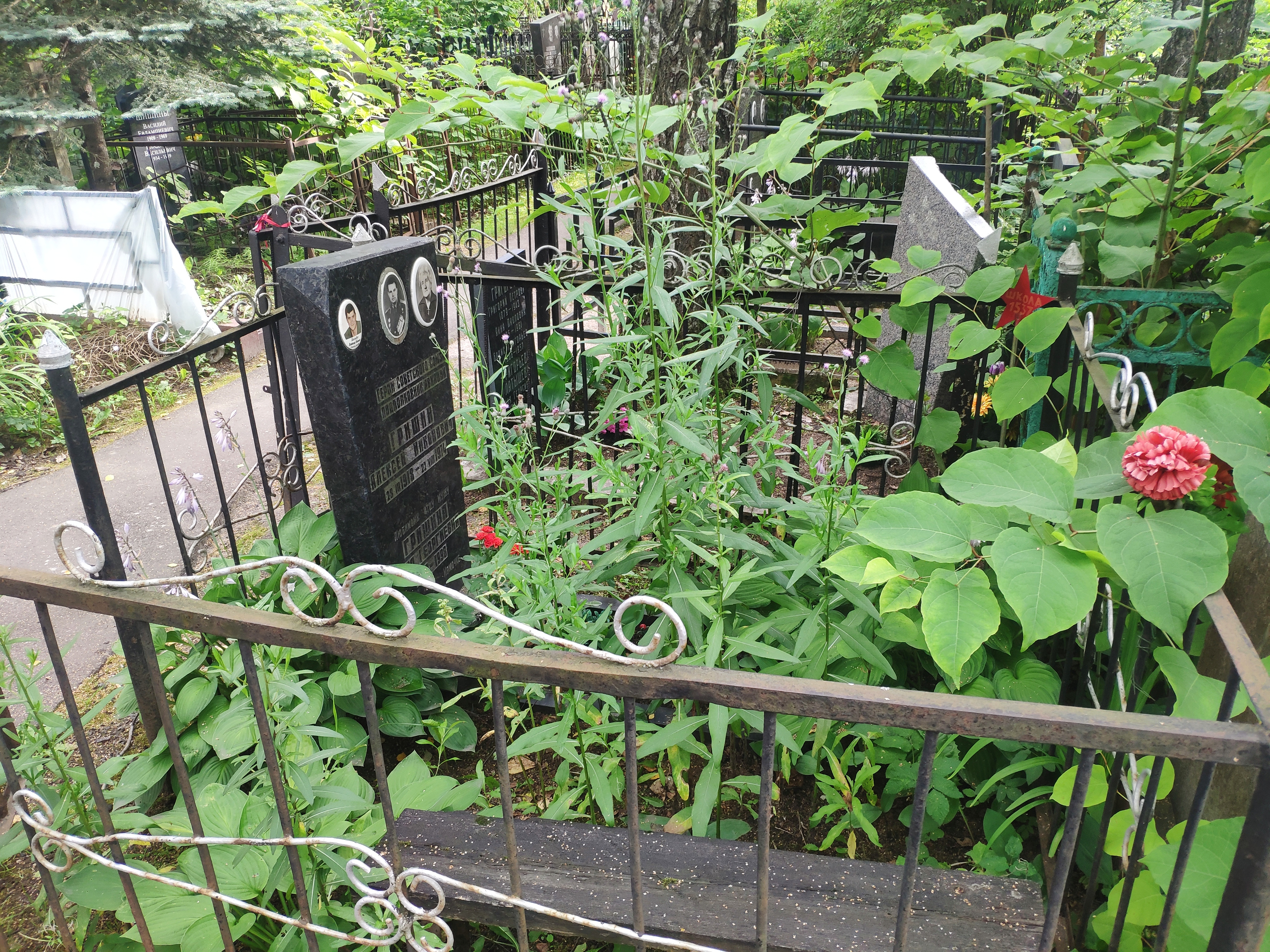 Могила, в которой похоронен Гришин Алексей Никонович (1918-1974), Герой Советского Союза: Бабушкинское кладбище, 6 участок, прямо на главной аллее, Ярославский, Северо-Восточный округ, Москва